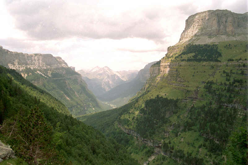 Valle de Ordesa tomado desde la zona intermedia de la Senda de Cazadores. Parque Nacional de Ordesa y Monte Perdido, Aragón.